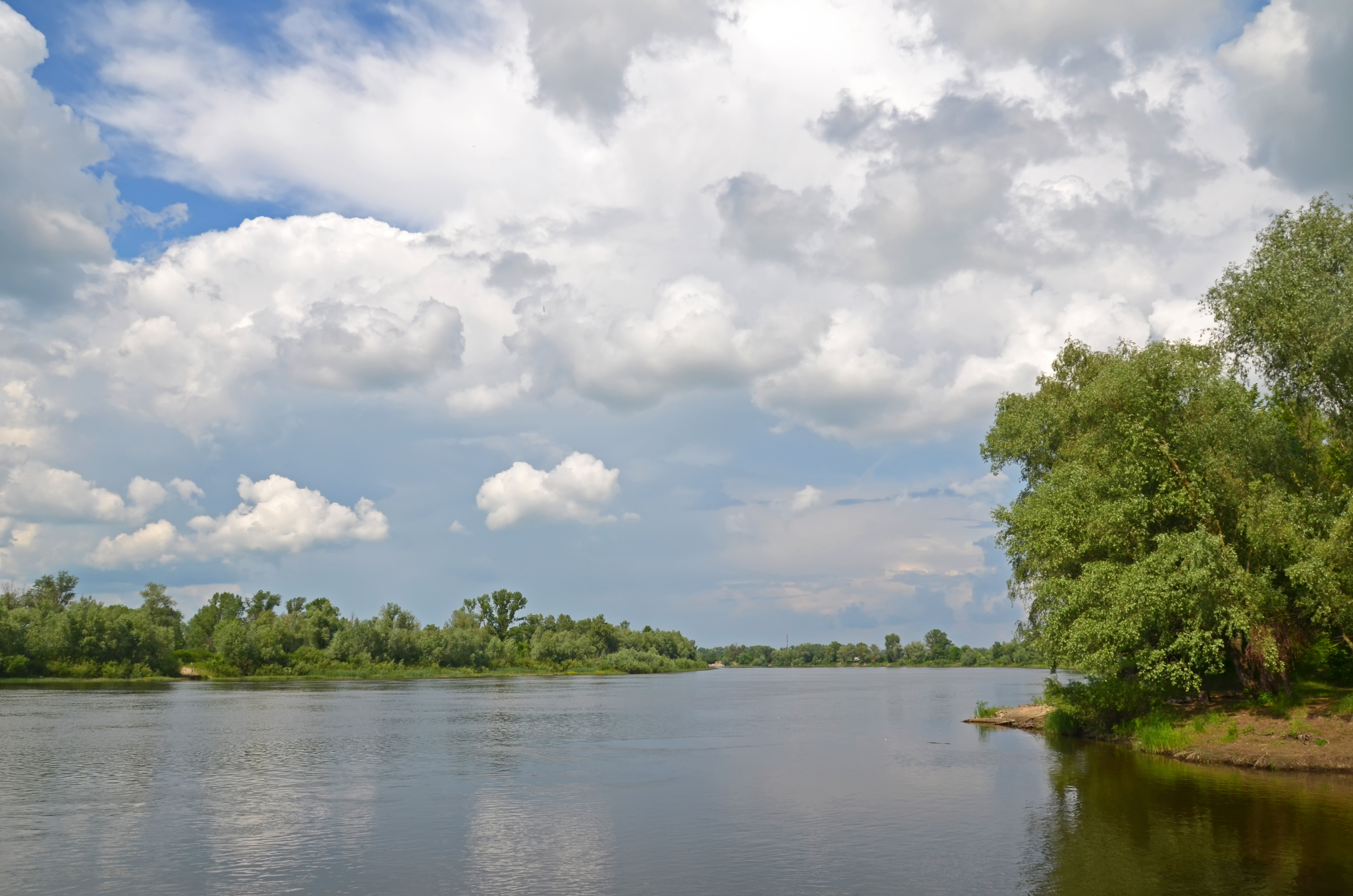 Зачарована Десна, Вишгородський район та Броварський район